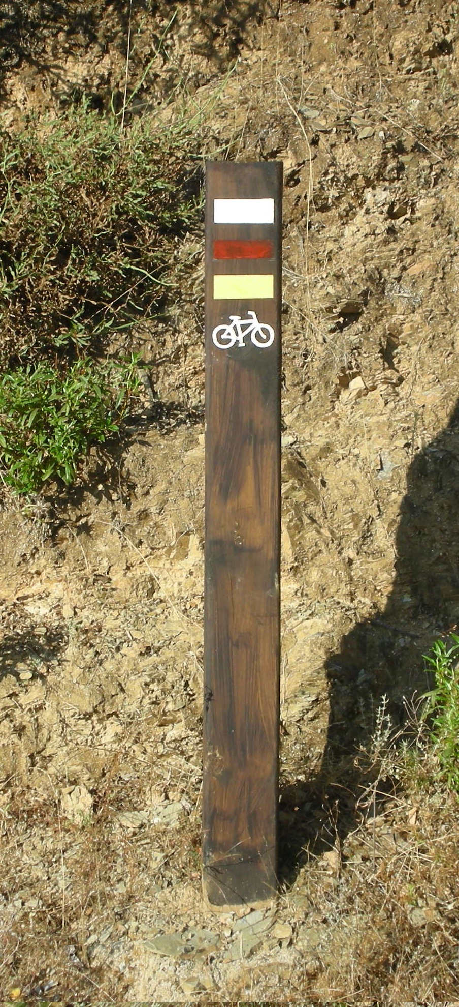 Balisage de sentiers VTT sur la commune de Sotoserrano en Espagne